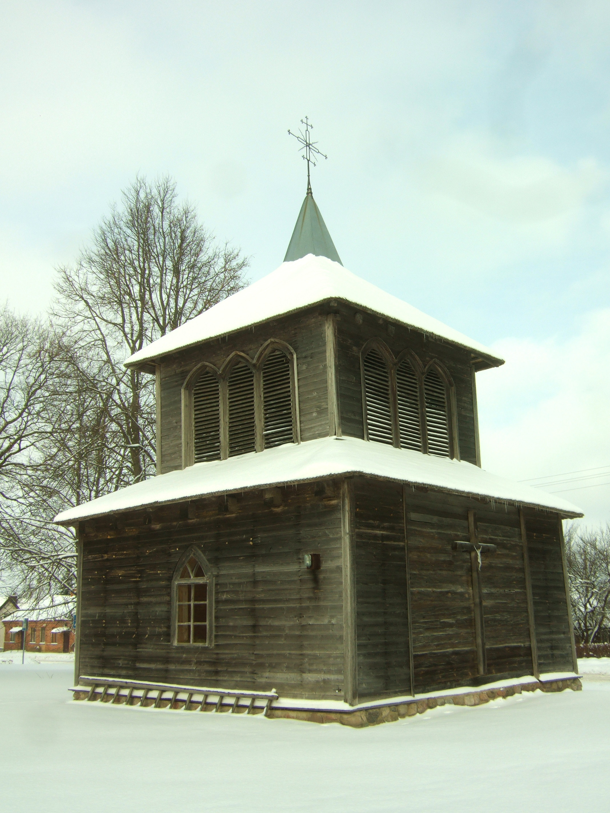 Musninkų Švč. Trejybės bažnyčios varpinė.